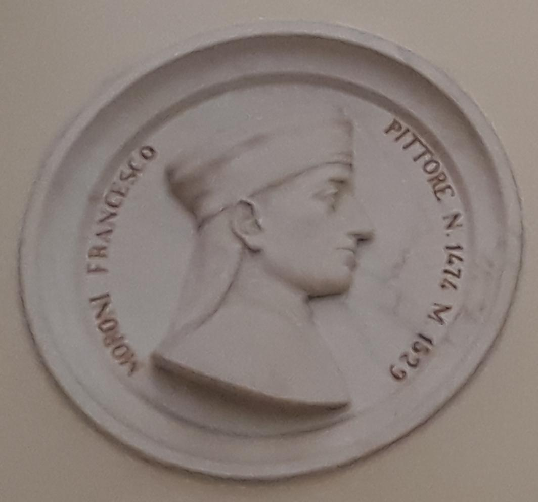 Raffigurazione di Francesco Morone